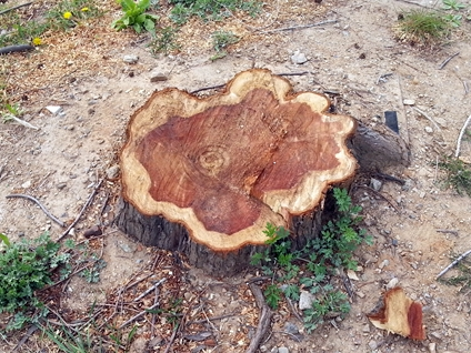 그루터기. 잘린지 얼마 되지않은 나무의 그루터기이다. (인천대삼거리 교통섬)